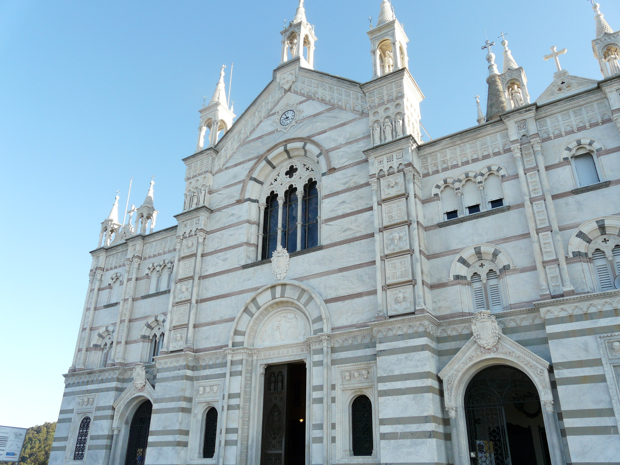 Facciata del Santuario di Nostra Signora di Montallegro, Rapallo, Liguria, Italia